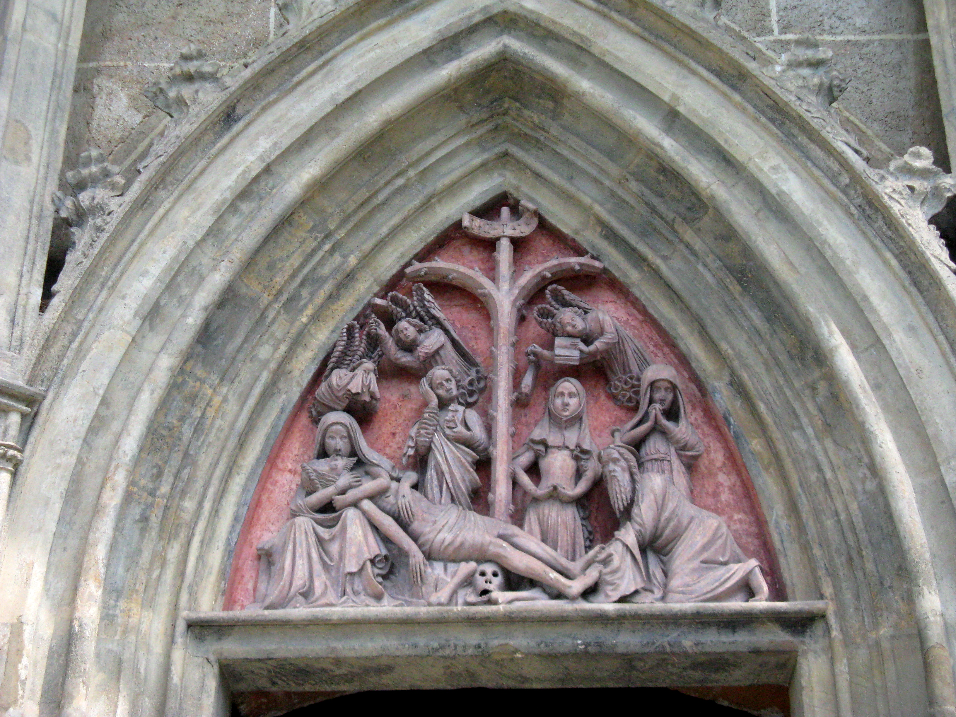 Maria Straßengel, Süd-Porta, Tympanon BeweinungChristi